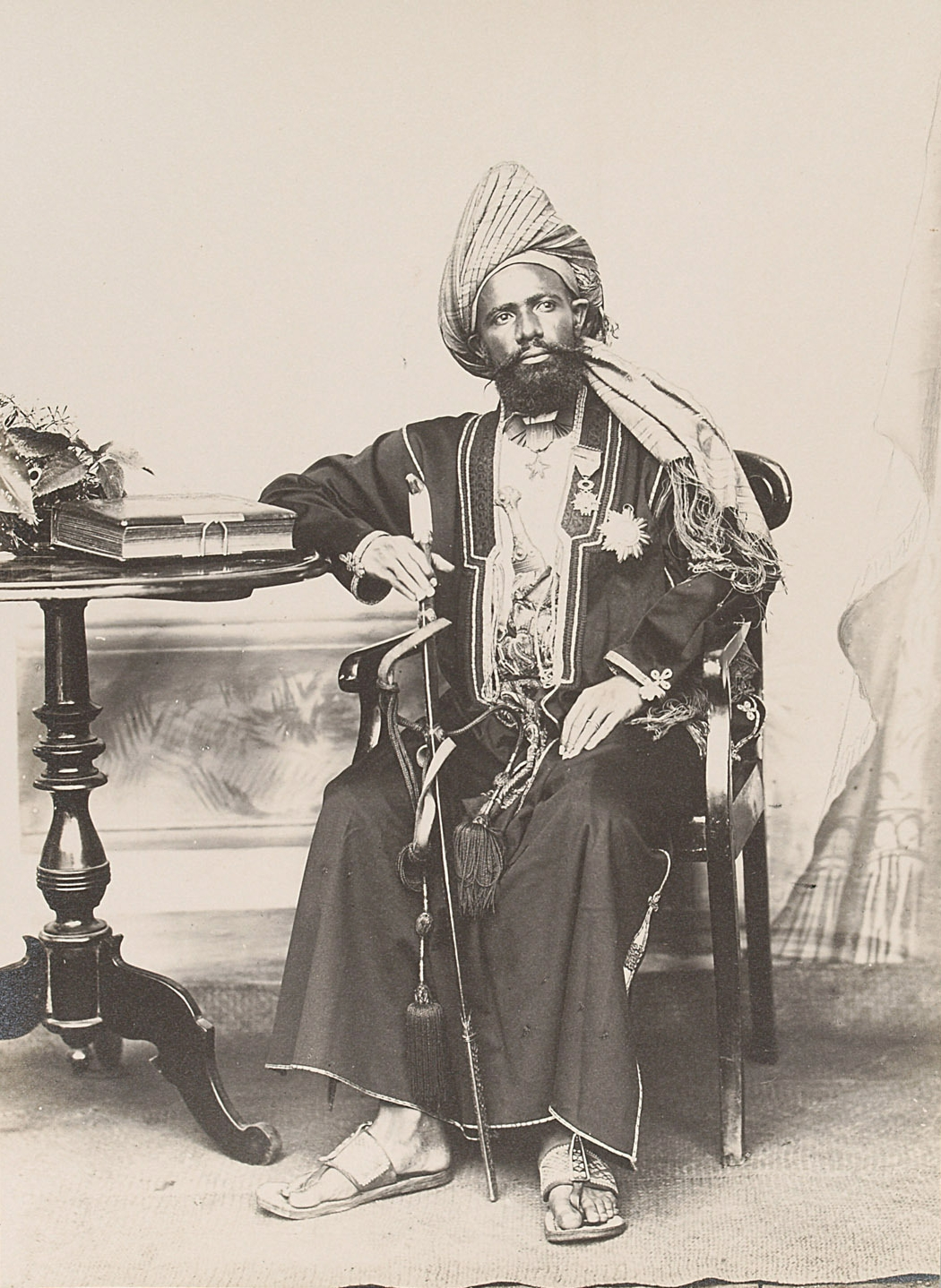 Said Ali, Sultan v. Gross-Comoro, im Exil auf Reunion (März 97 phot.) Geografische Zuordnung: Afrika südlich der Sahara\Indischer Ozean\Reunion Museum für Völkerkunde Wien, Fotosammlung Inv.-Nr. VF_5511 Schenkung: Franz Sikora